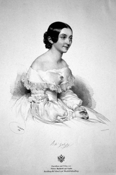 Rita Gabussi (ca. 1810 - 1891), italienische Sängerin. Ehefrau des Baritons Achille De Bassini. Lithographie von Josef Kriehuber, 1840